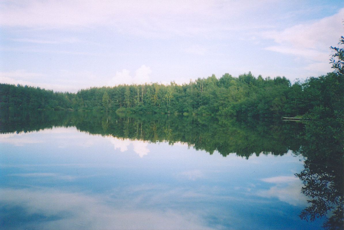 Ближнее (Поповское) озеро. Россия, ПГТ Угловка